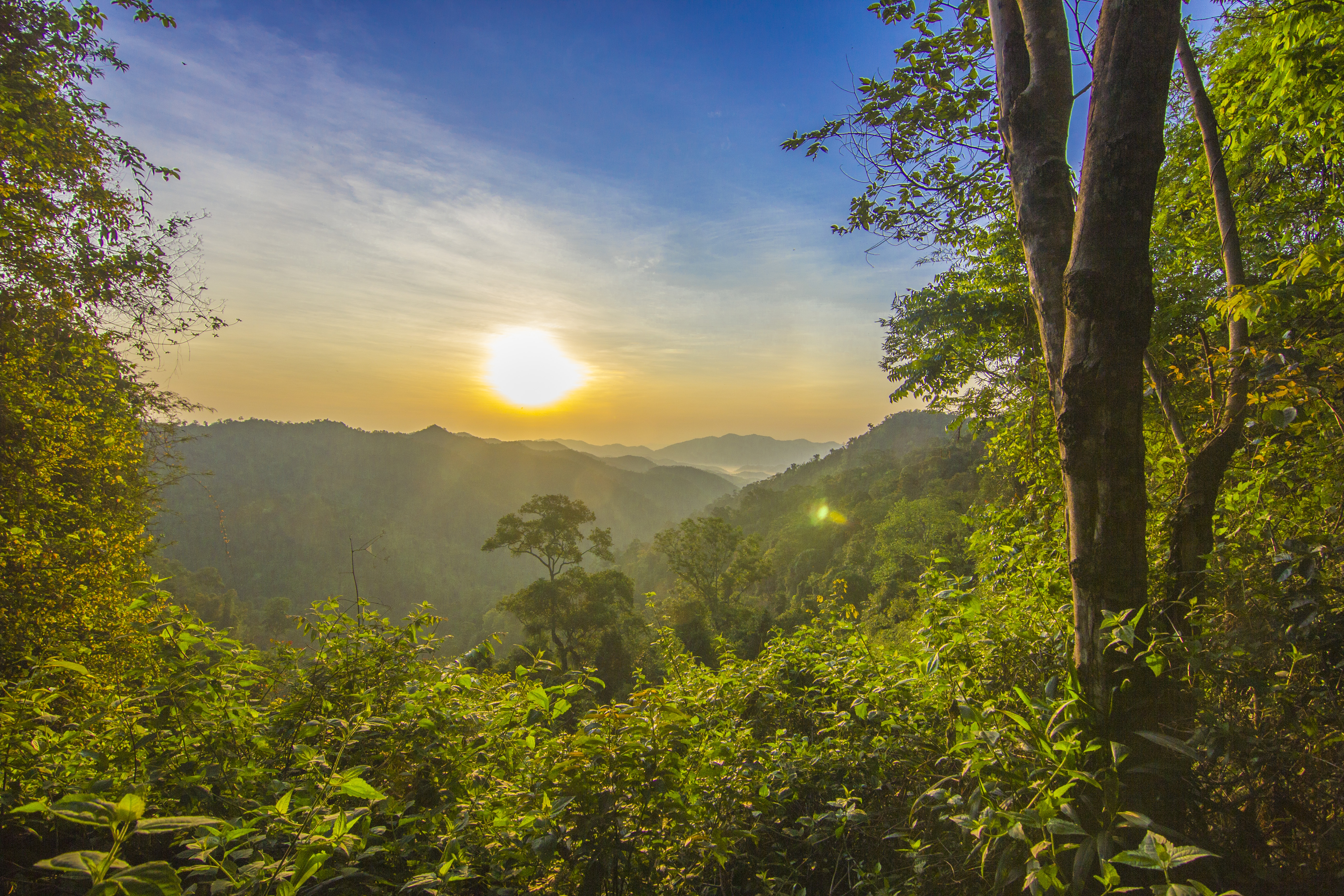 อุทยานแห่งชาติแก่งกระจาน